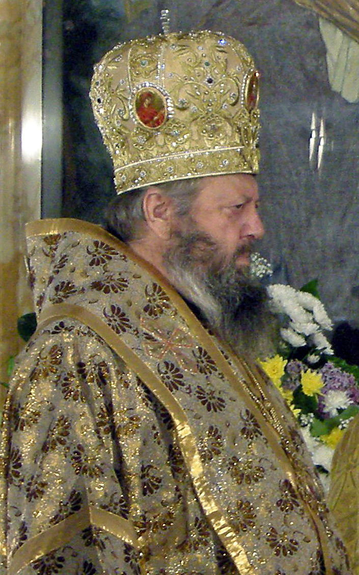 Епископ Константин (Петров) на патриаршей службе в 2008 году